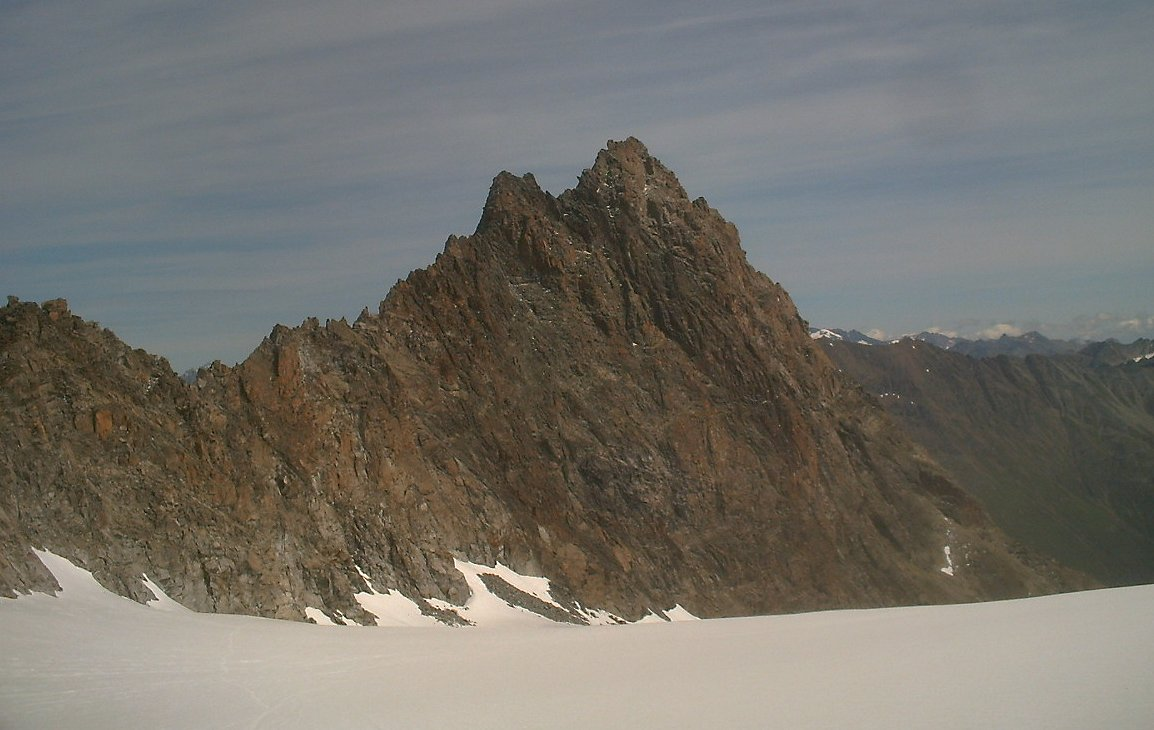 Ötztaler Alpen, Kaunergrat, Seekogel